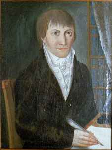 Friedrich Bährens (1765-1833), Ölgemälde